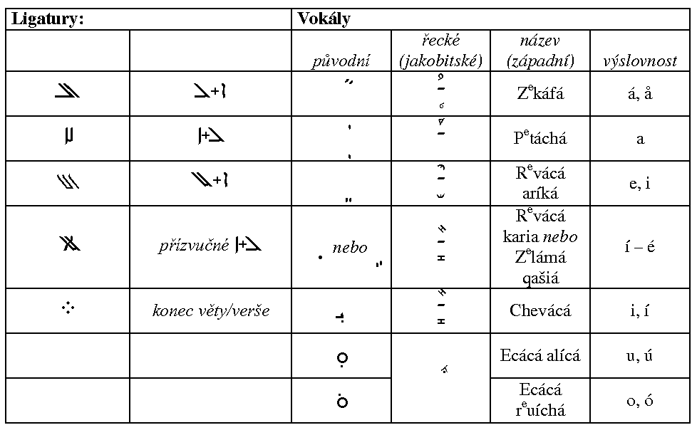 Tabulka vokálů a dalších znamínek v písmu Serto